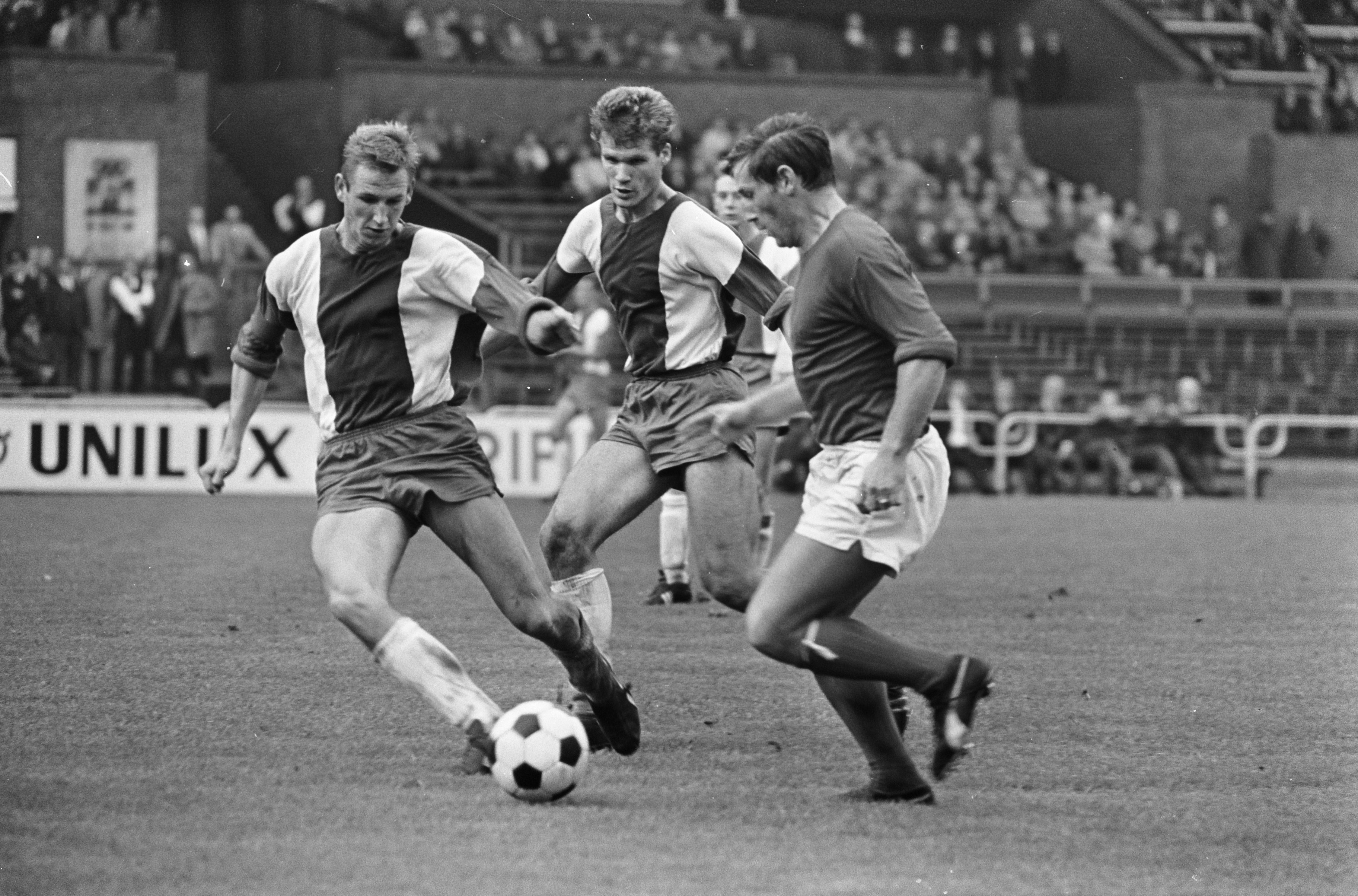 Match de football DWS - Elinkwijk (1966, 6-2). Frans Geurtsen (DWS, à droite) à la lutte avec les joueurs de Elinkwijk Koos van Tamelen (à gauche) et Jan Verkaik (au centre).